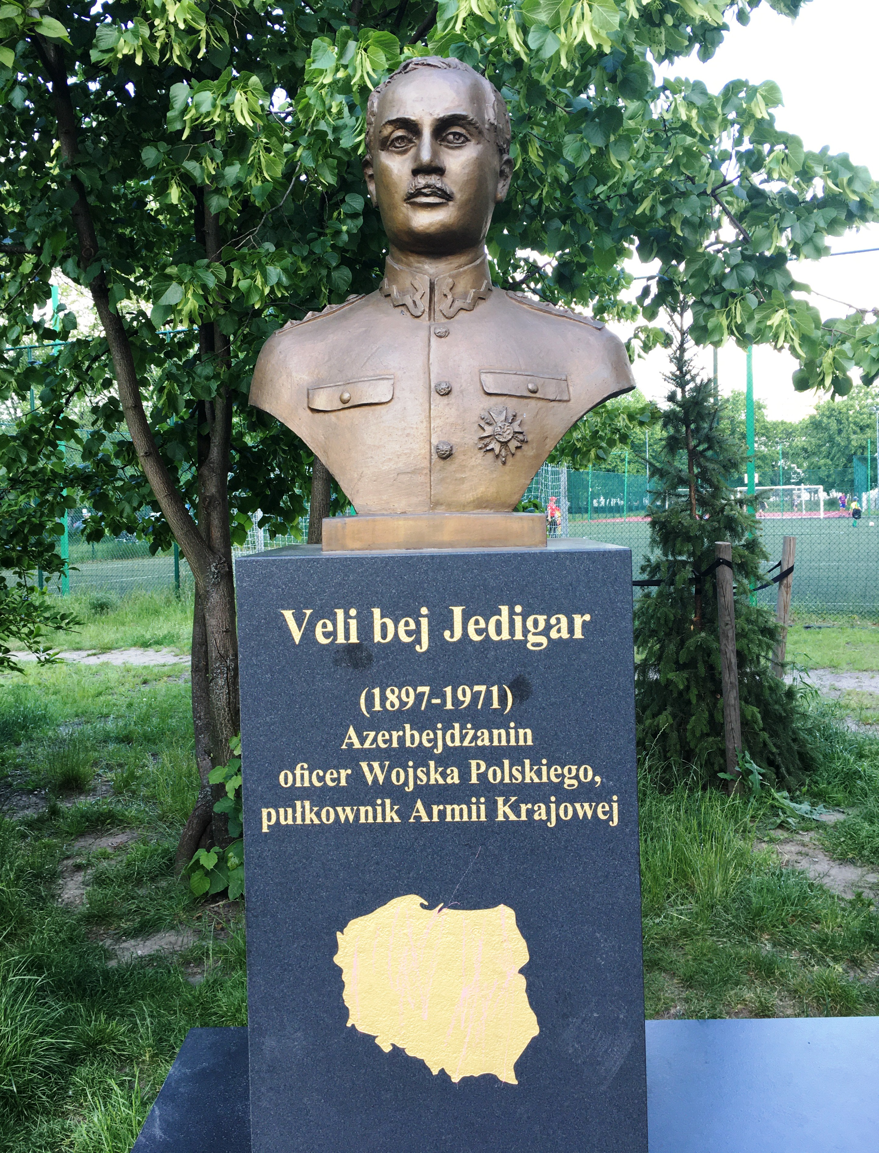 Vəli bəy Yadigarın Varşava şəhərinin Praqa rayonunda ucaldılmış abidəsi